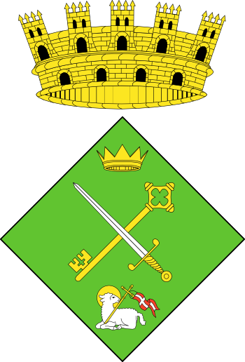 Escut d'Arres, municipi dera Val d'Aran, Occitània